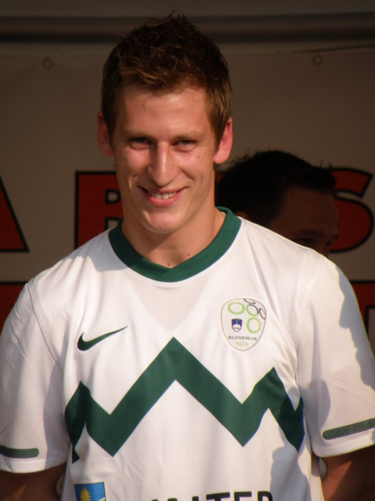 Valter Birsa na sprejemu v Novi Gorici.